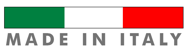 SMEG Made in Italy